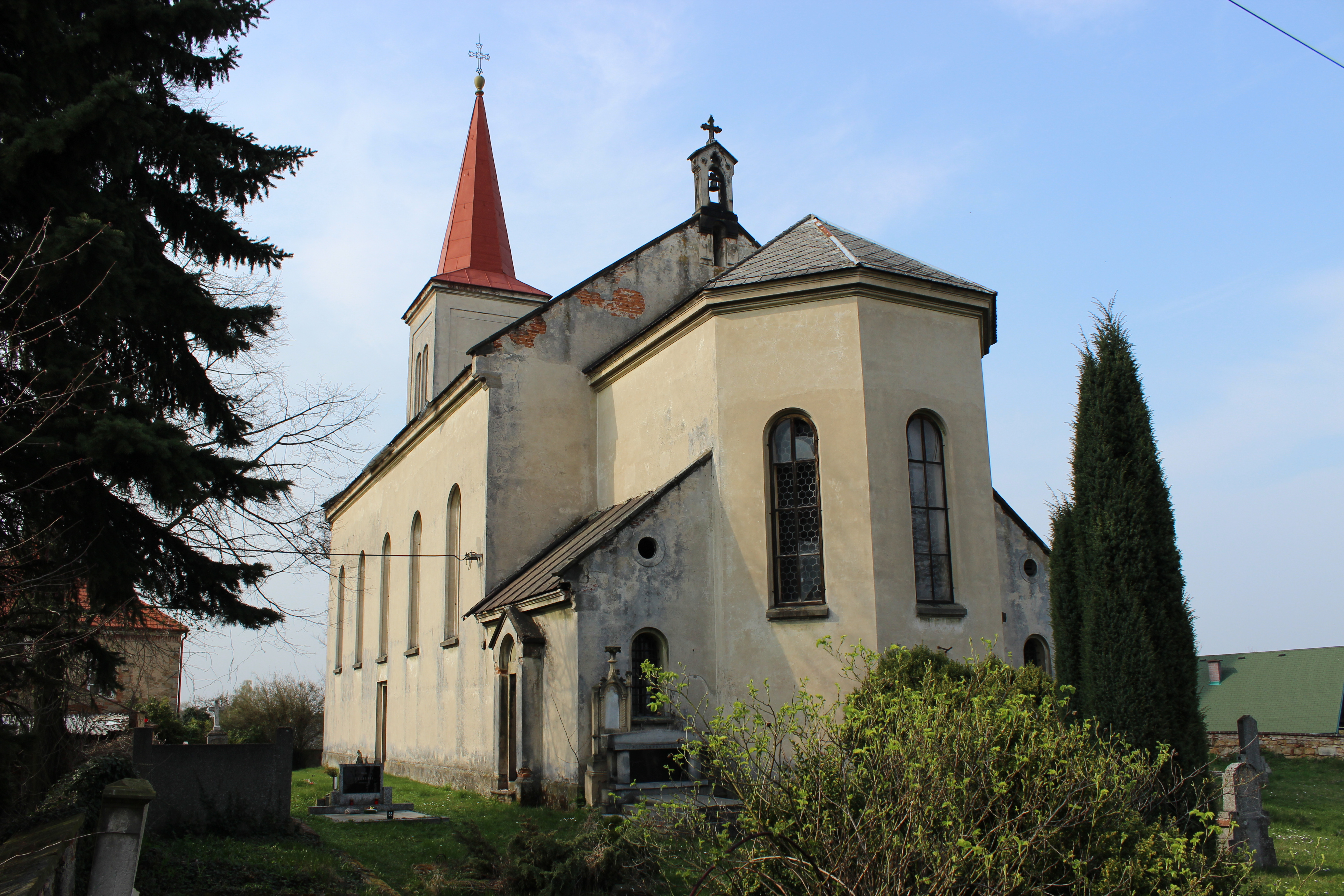 Kostel svatého Václava v Bezdědicích, části Bělé pod Bezdězem (pohled od jihu). This photograph was taken with a Canon EOS 600D